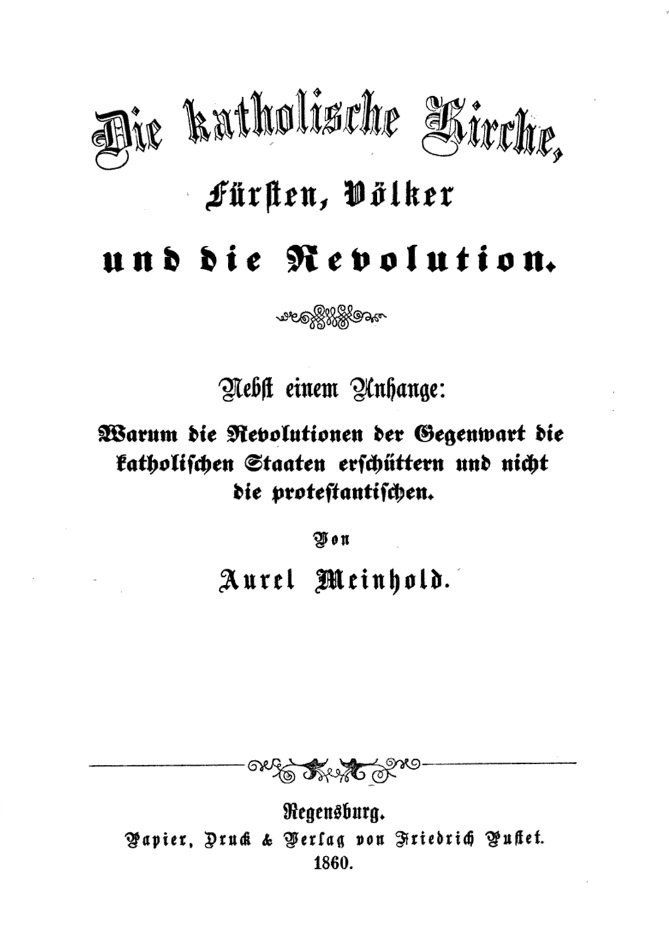 Aurel Meinhold: Die katholische Kirche, Fürsten, Völker und die Revolution. Regensburg 1860, Titelseite